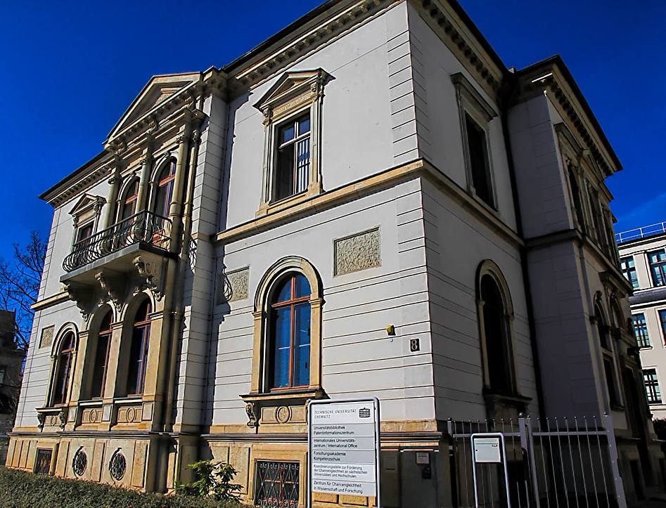 Gebäude des PatentInformationsZentrums Chemnitz, Bahnhofstraße 8